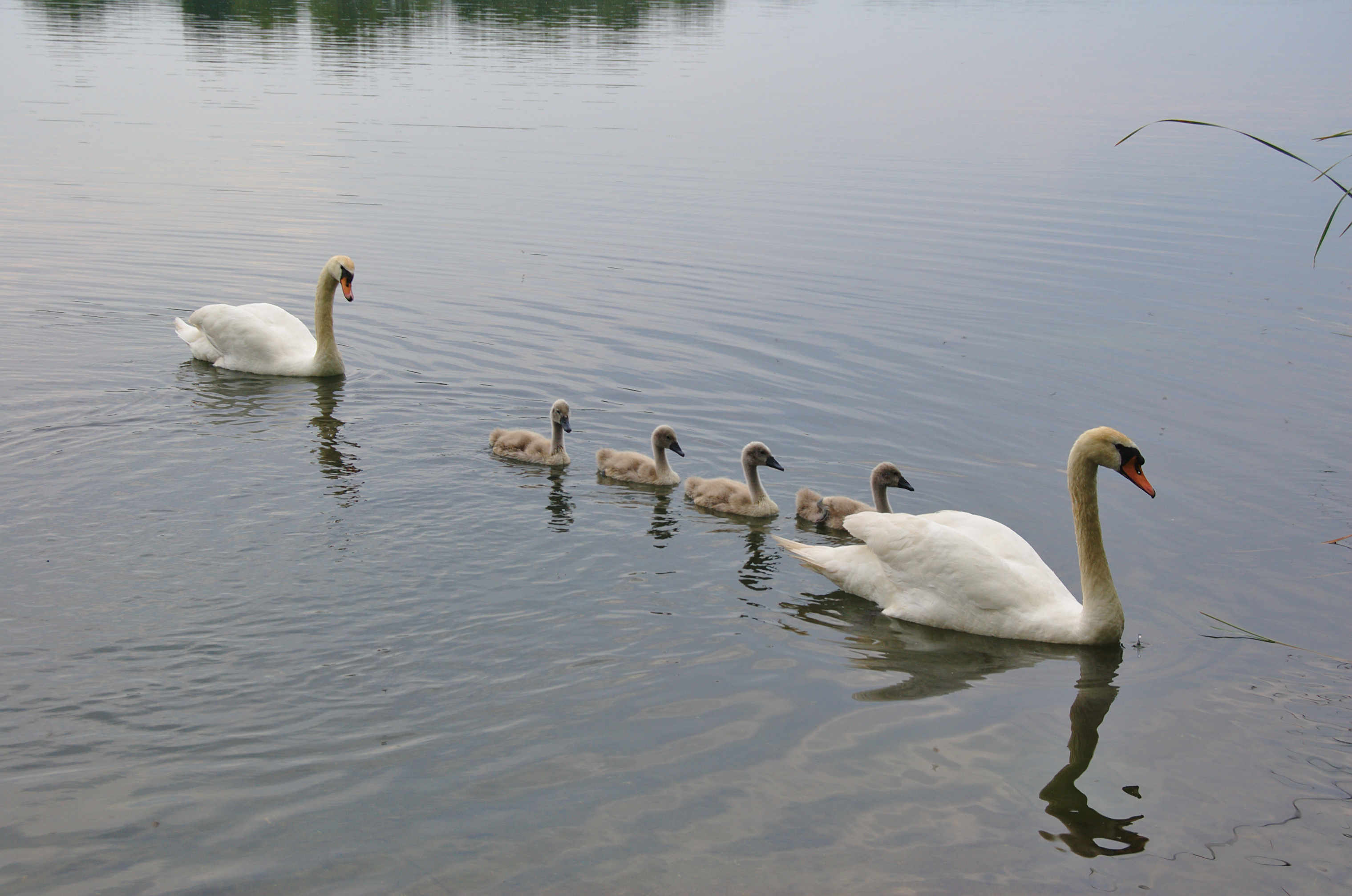 Labutí pár se čtyřmi mladými, Chomoutovské jezero, okres Olomouc